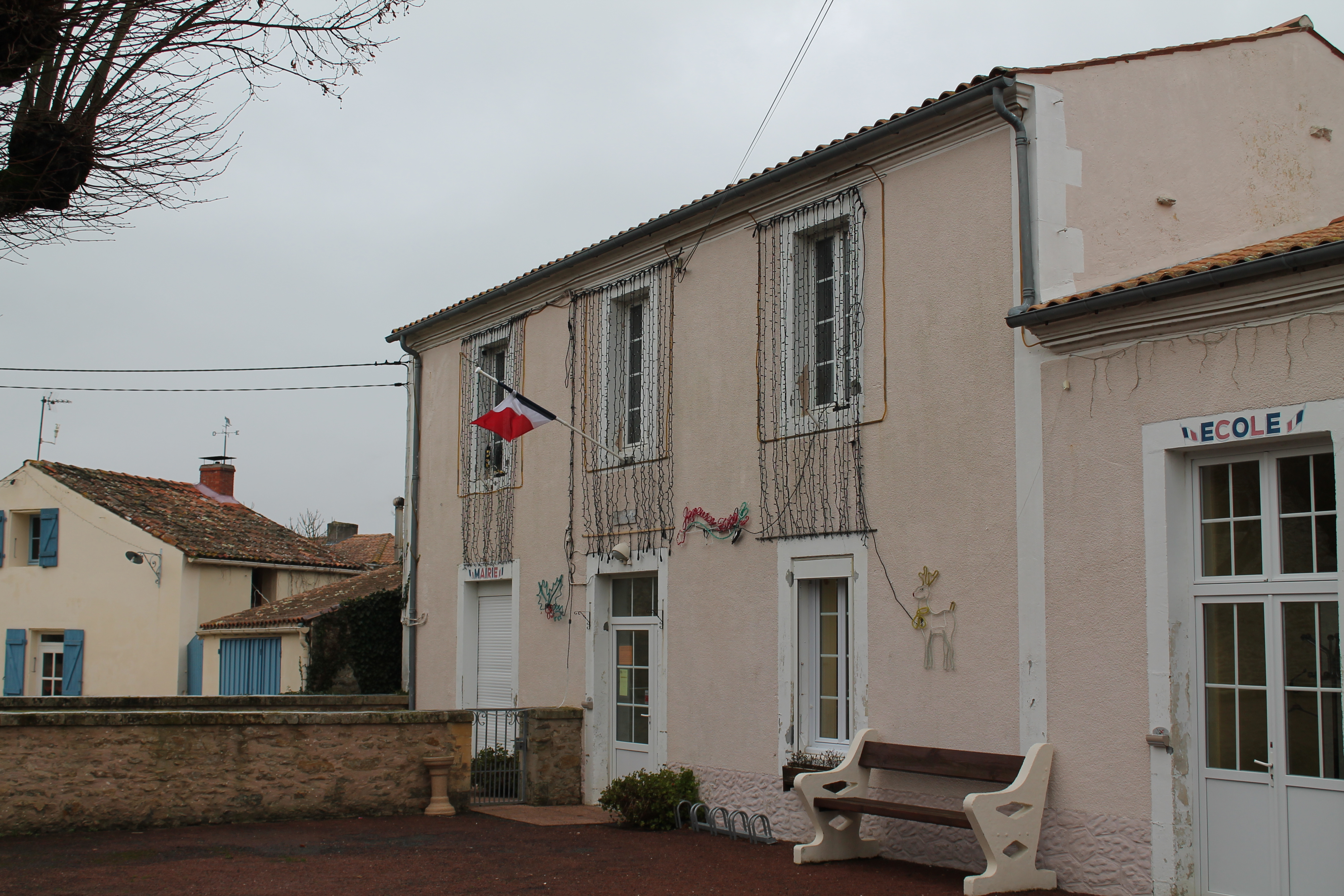 Mairie de Loire-les-Marais.